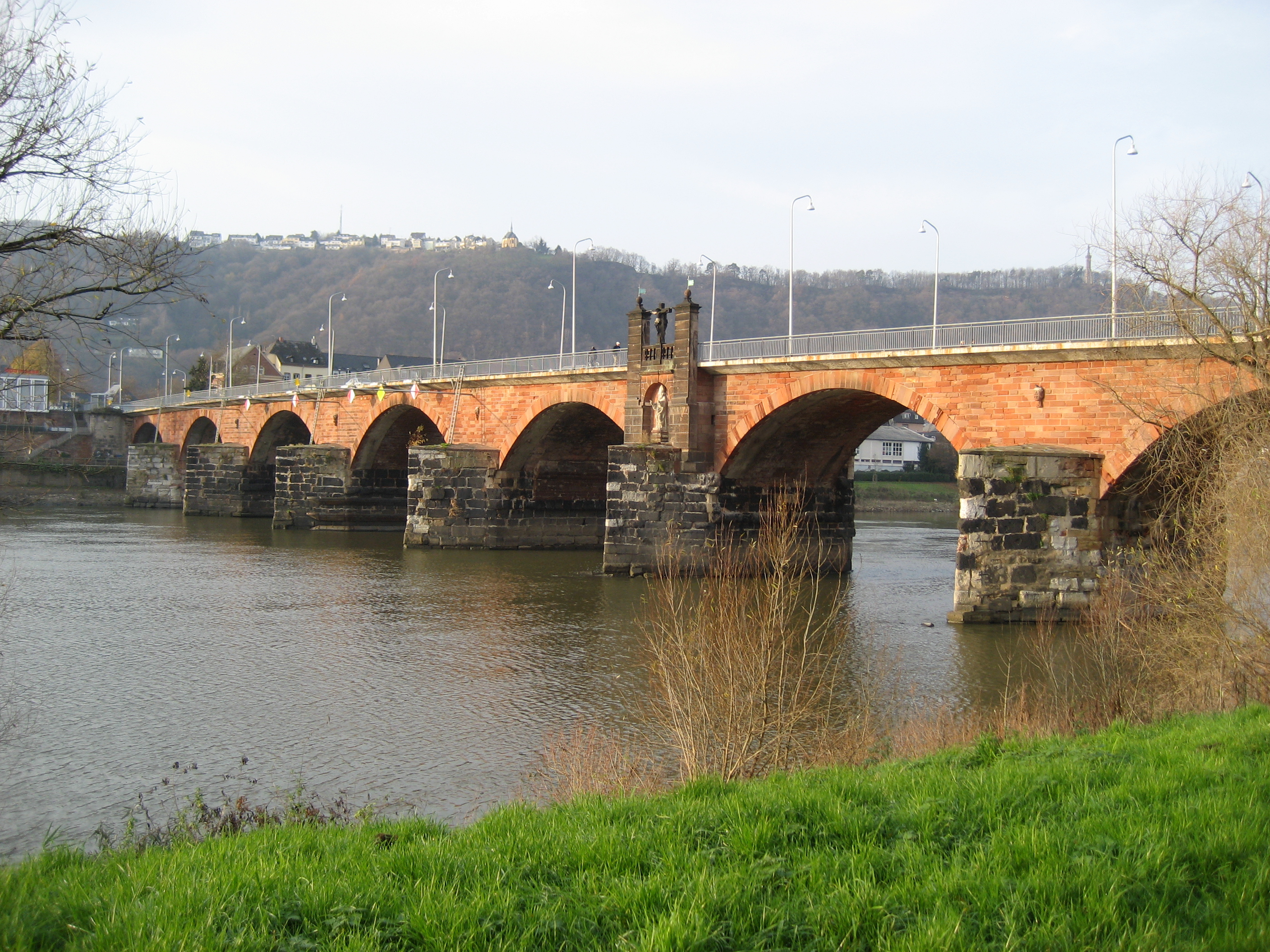 roemerbruecke_trier.jpg